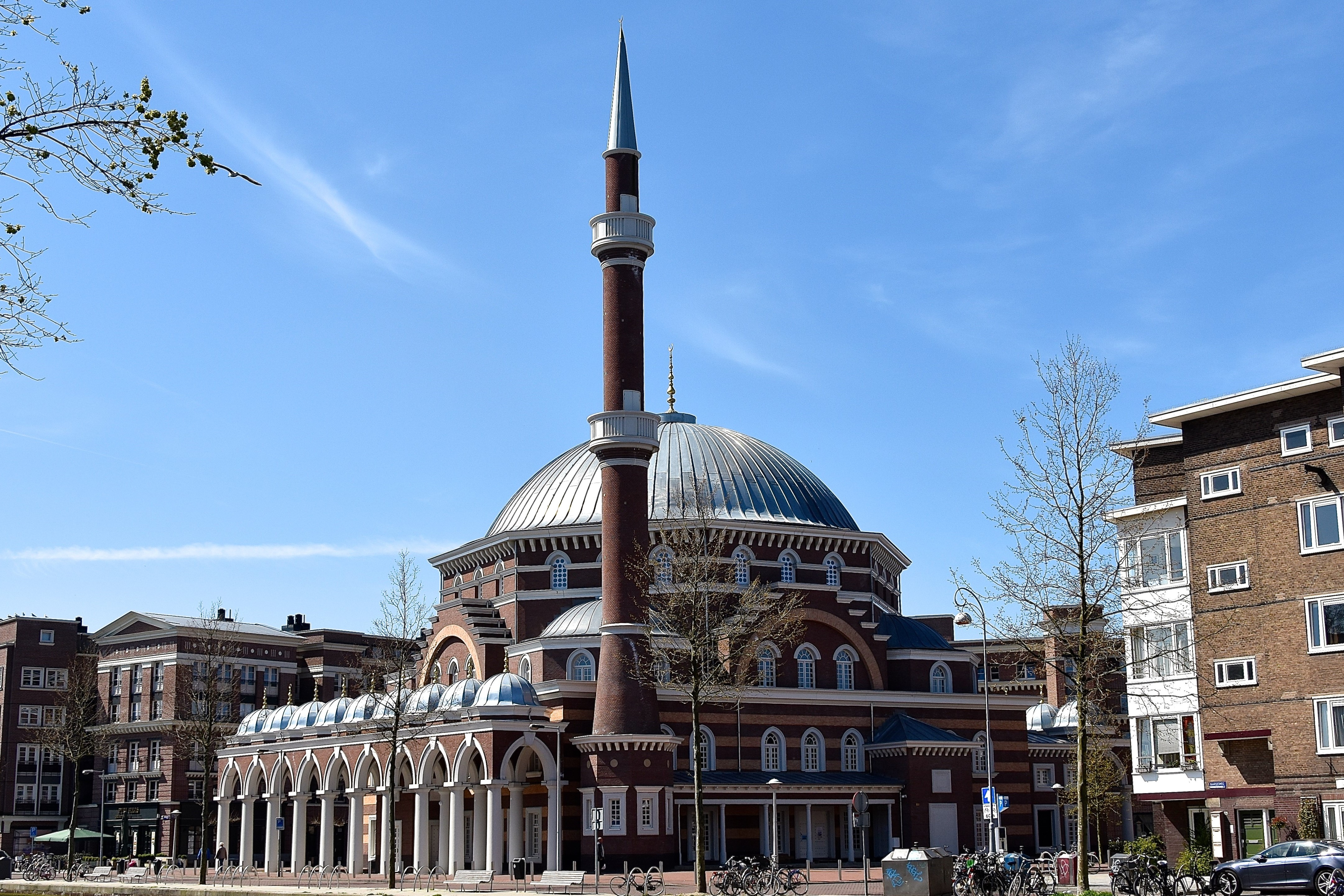 Piri Reïsplein In de 20e eeuw was hier het autobedrijf Opel Riva gevestigd. Het Riva-terrein werd in 1994 aangekocht door de Vereniging Ayasofya, behorend tot de beweging Milli Görüş, ten einde hier een moskee en Turks centrum te vestigen. In het najaar van 2013 werd op het plein begonnen met de bouw van de Westermoskee. Zowel het woningencomplex als de moskee zijn ontworpen door het Frans-joodse architectenpaar Marc en Nadia Breitman, die zich lieten inspireren door zowel de bouwstijl van de Amsterdamse School als door de Aya Sophia-moskee in Istanbul. In april 2016 ging de moskee open. Bron